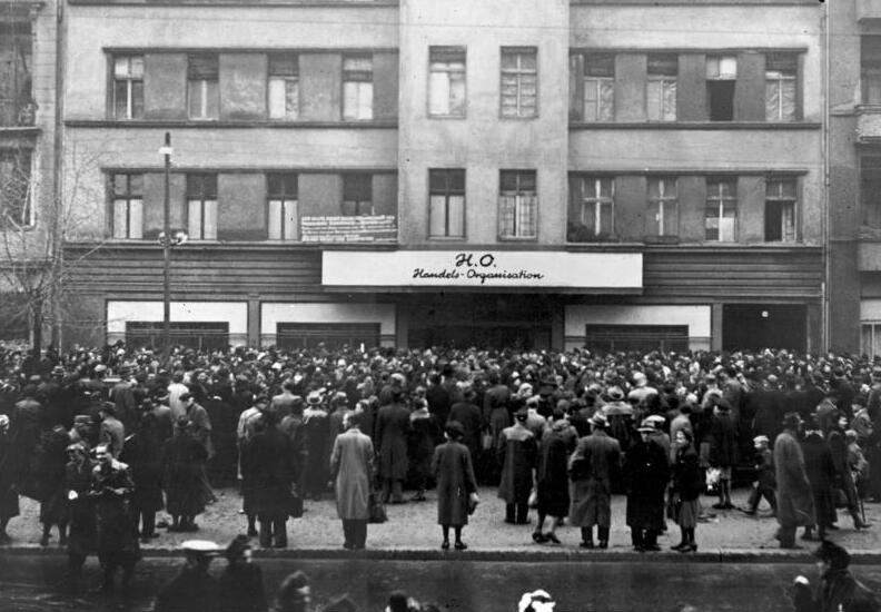 Berlin, Eröffnung des 1. HO-Kaufhauses ADN-ZB-Illus-Schöller Publikumsandrang am Eröffnungstage des ersten Kaufhauses der HO in der Frankfurter Allee in Berlin im November 1948. 4452-49